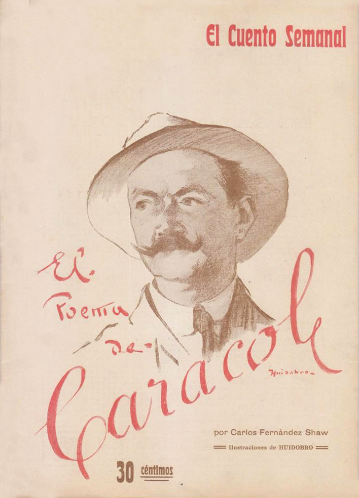 Portada de El poema de caracol.